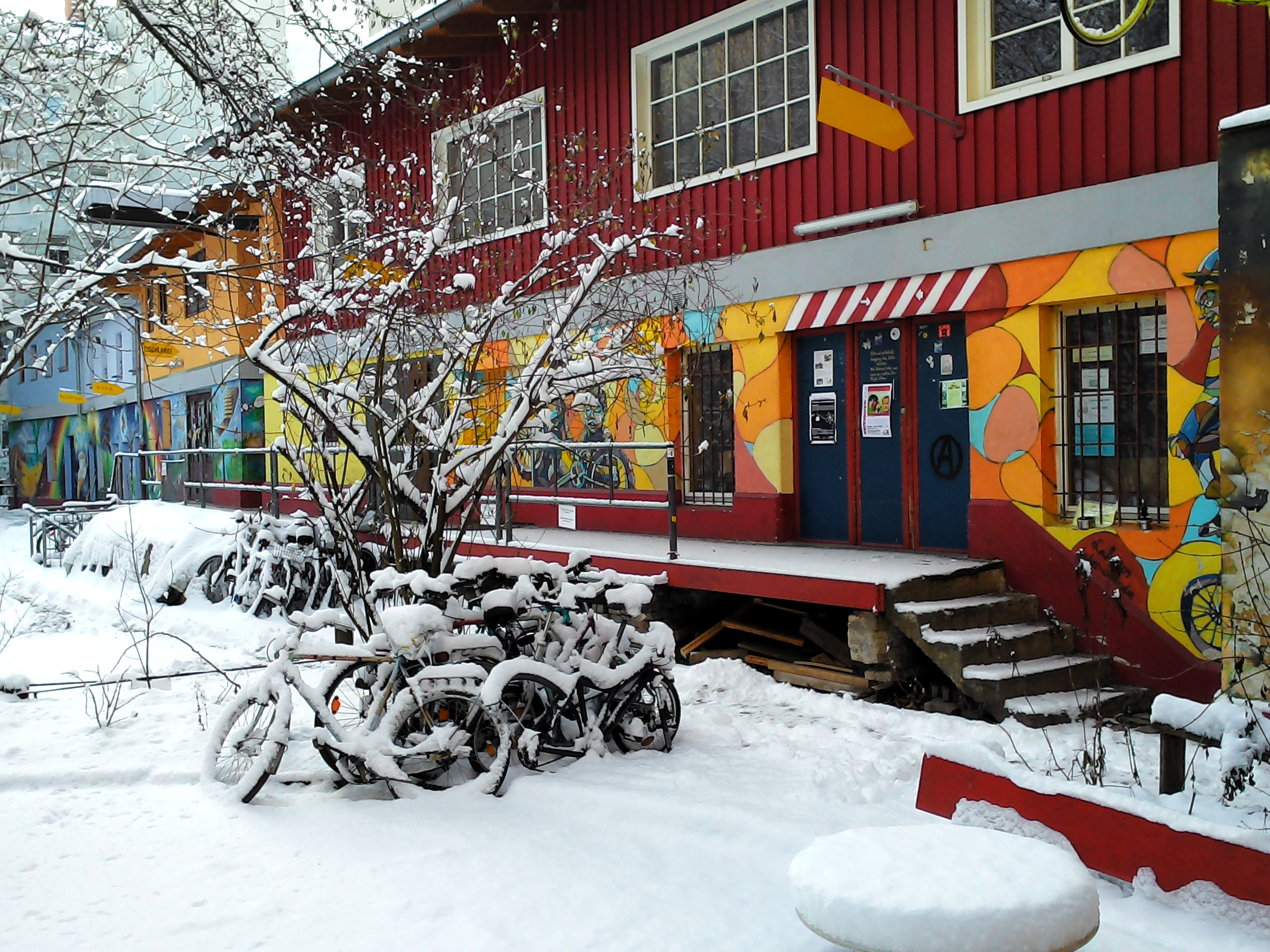 Regenbogenfabrik: 1981 besetztes und heute legales Alternativprojekt in Berlin-Kreuzberg, Germany